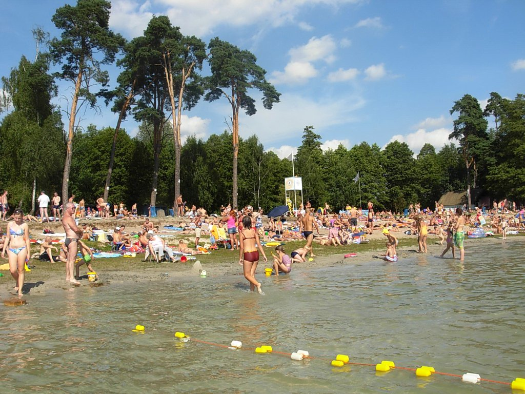 Jezioro Borówno k Bydgoszczy. Plaża miejska